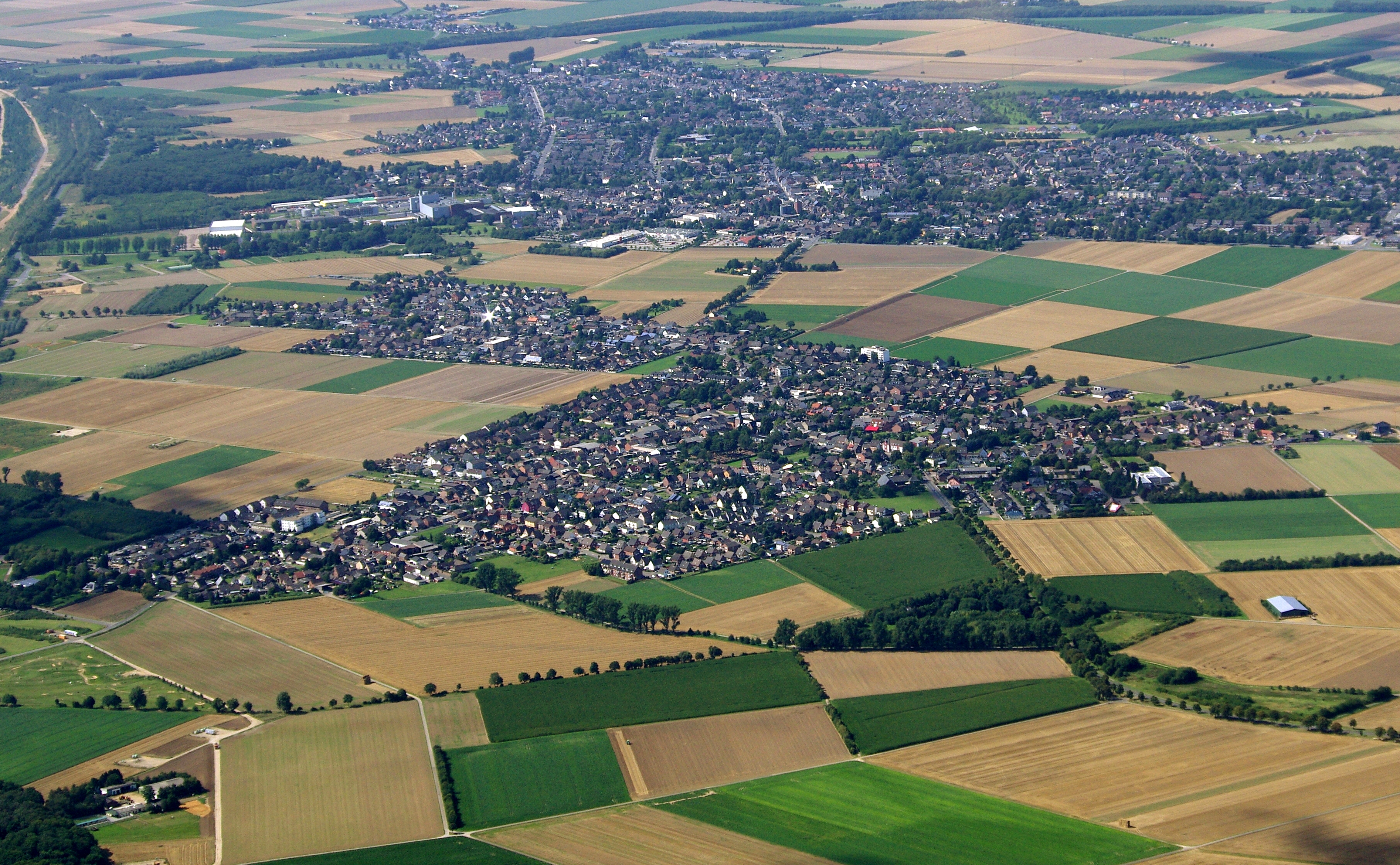 Berrendorf-Wüllenrath und Giesendorf; im Hintergrund Elsdorf.